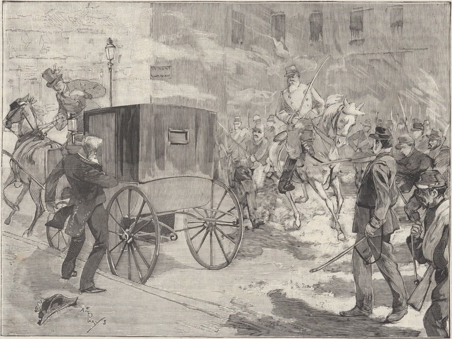 Attentat contre le Baron de Ladario, ancien ministre de la marine (dessin de M. Parys).